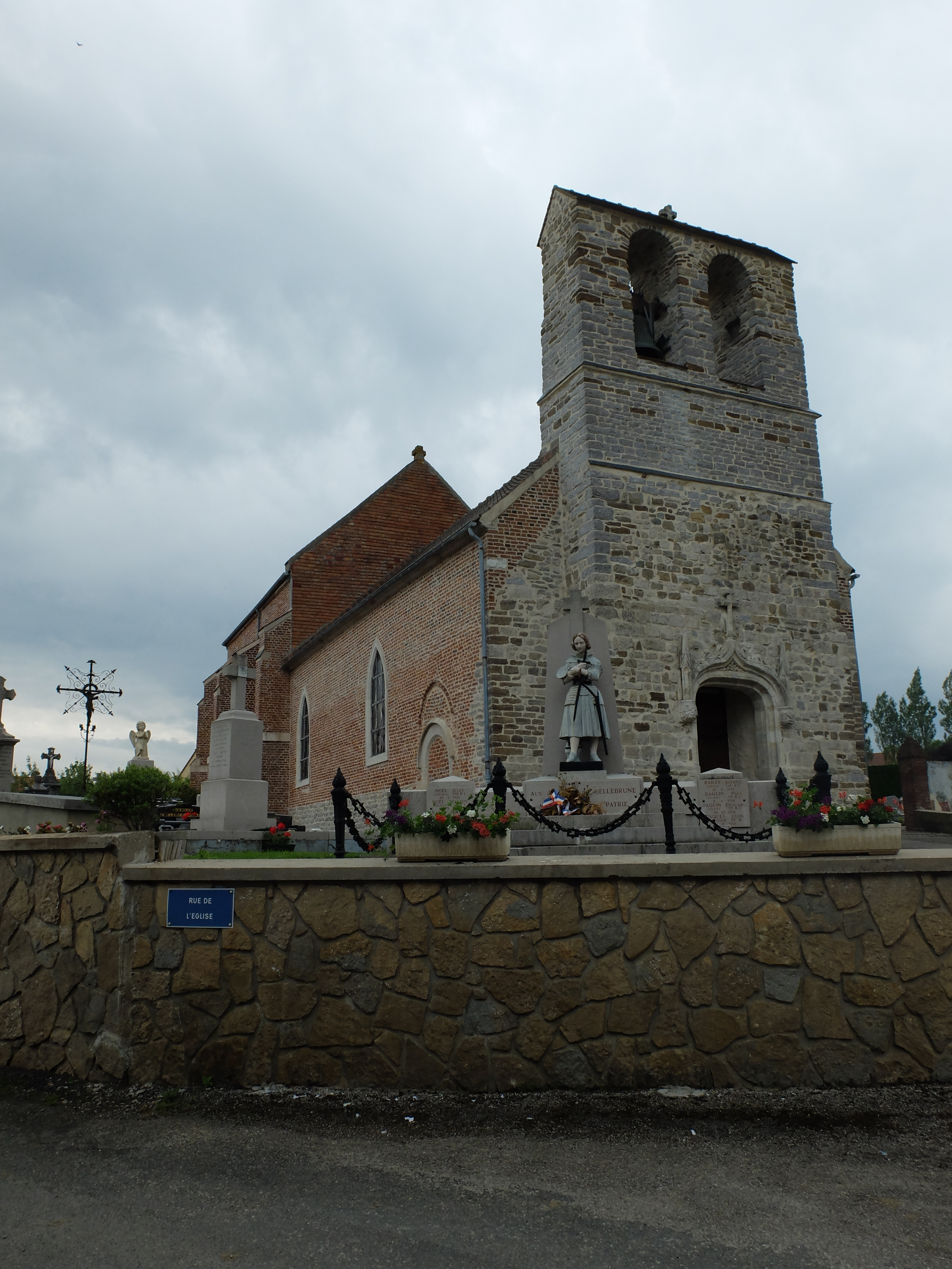 Vue de l'église Saint-Leu de Bellebrune. Le monument aux morts figure sur l'image.